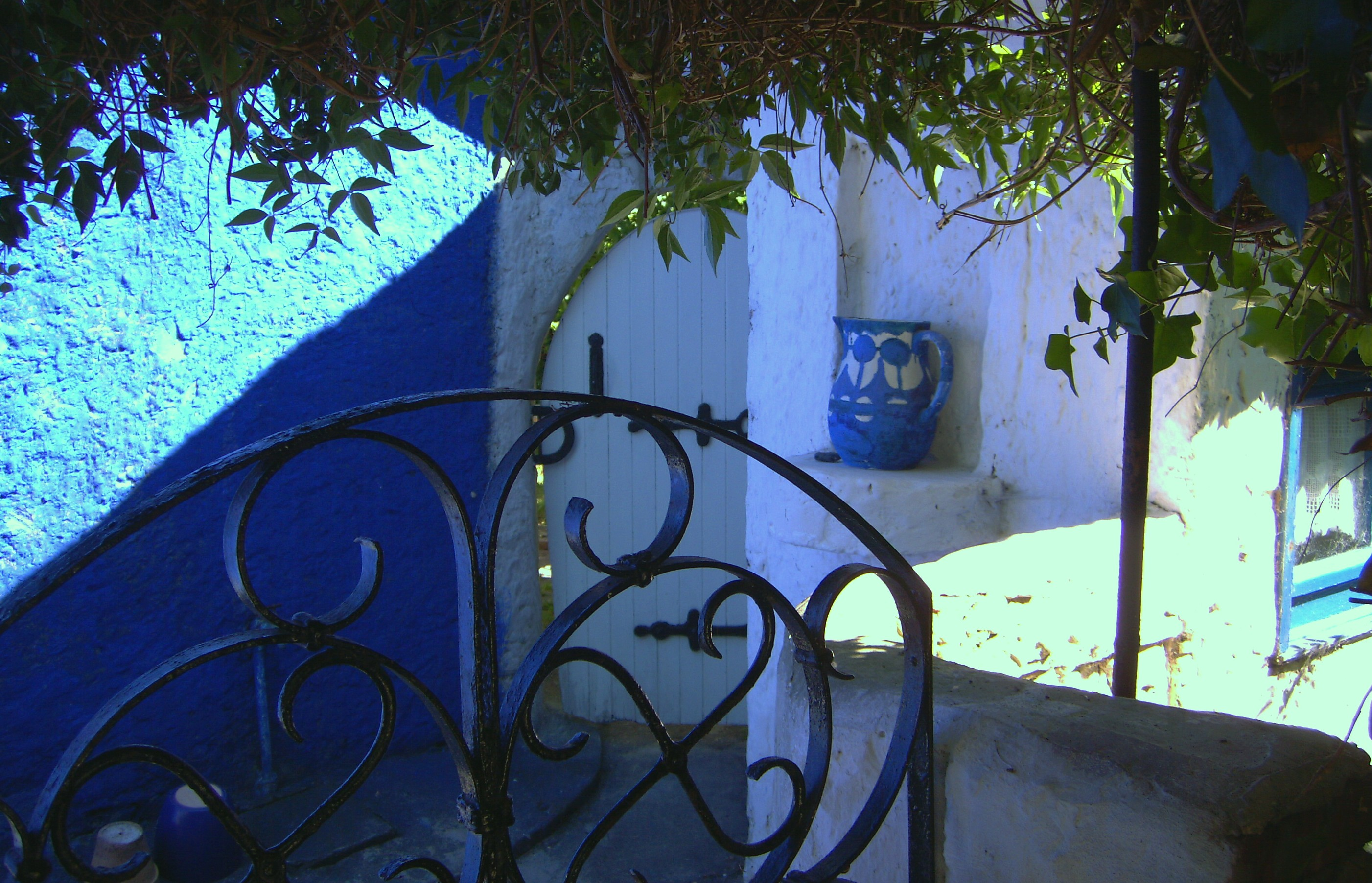 Blaue Scheune Hiddensee Rückseite 2006